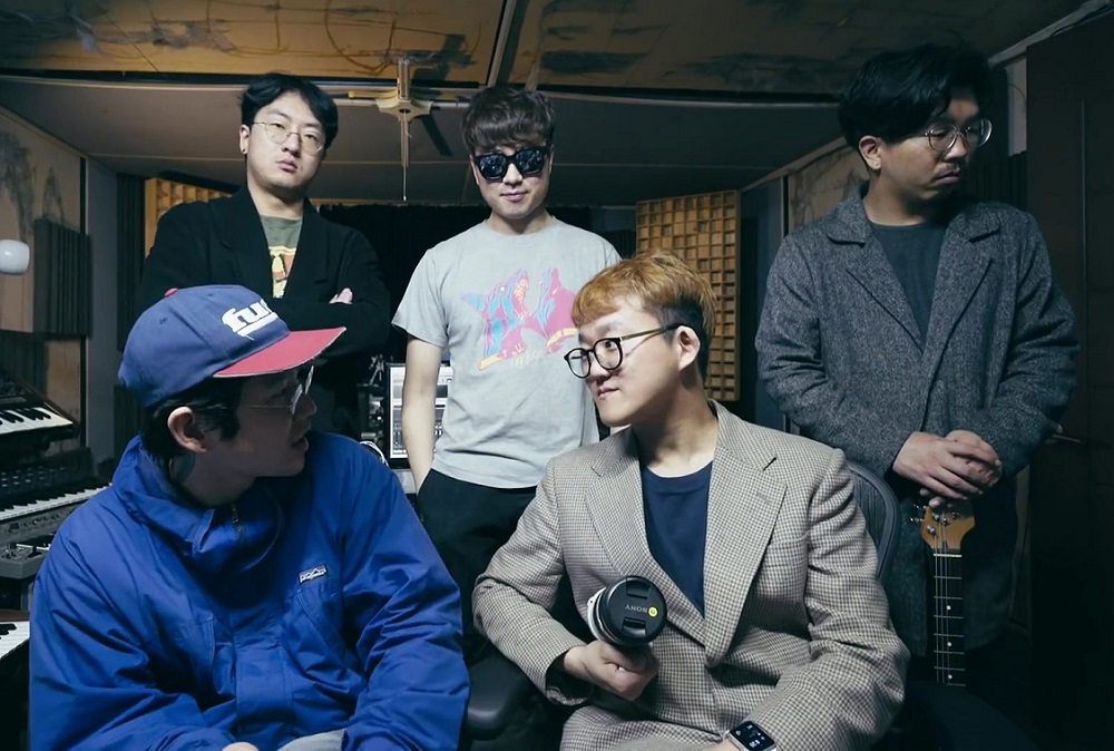 2016년의 술탄 오브 더 디스코